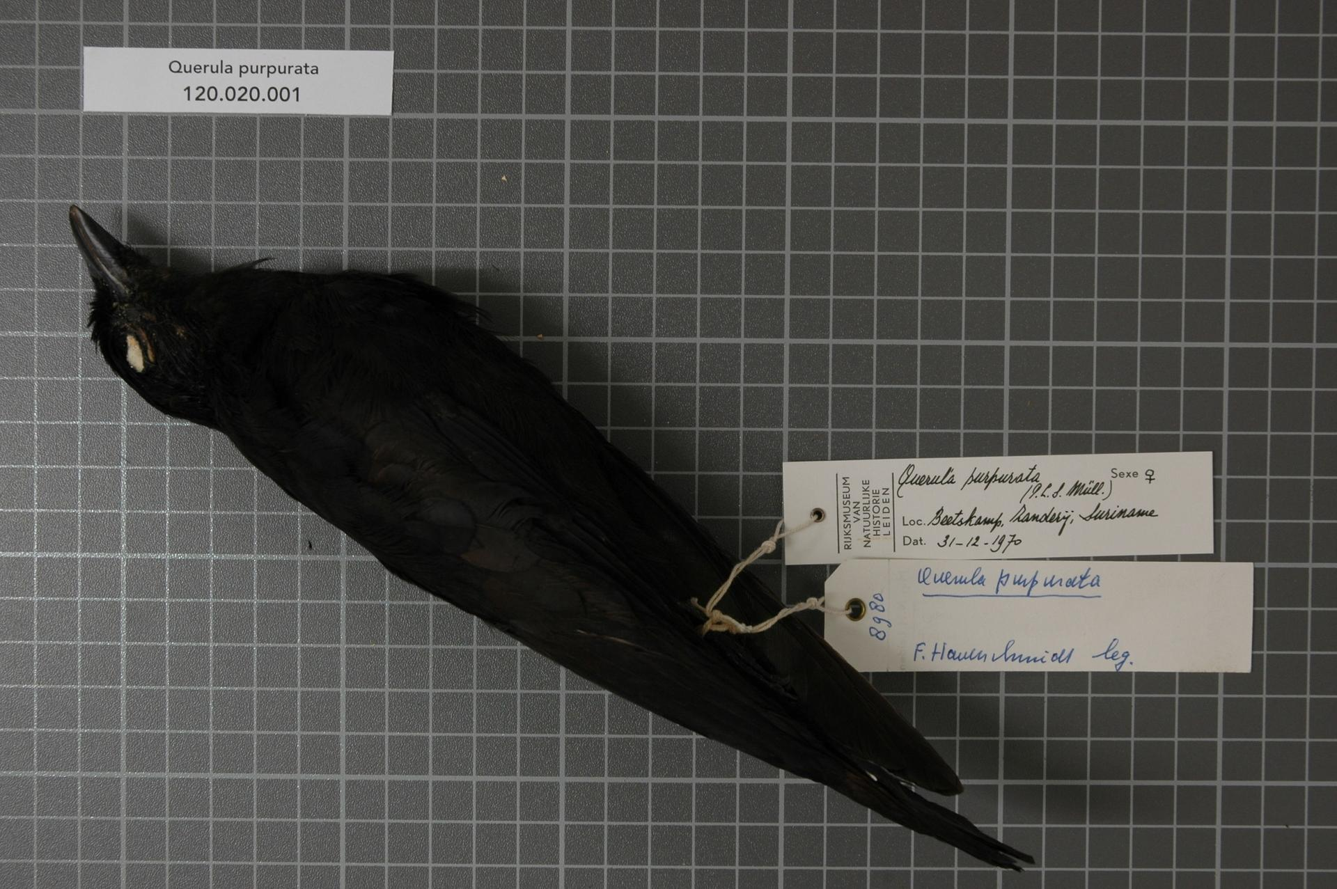 Querula purpurata (P.L.S. Muller, 1776)